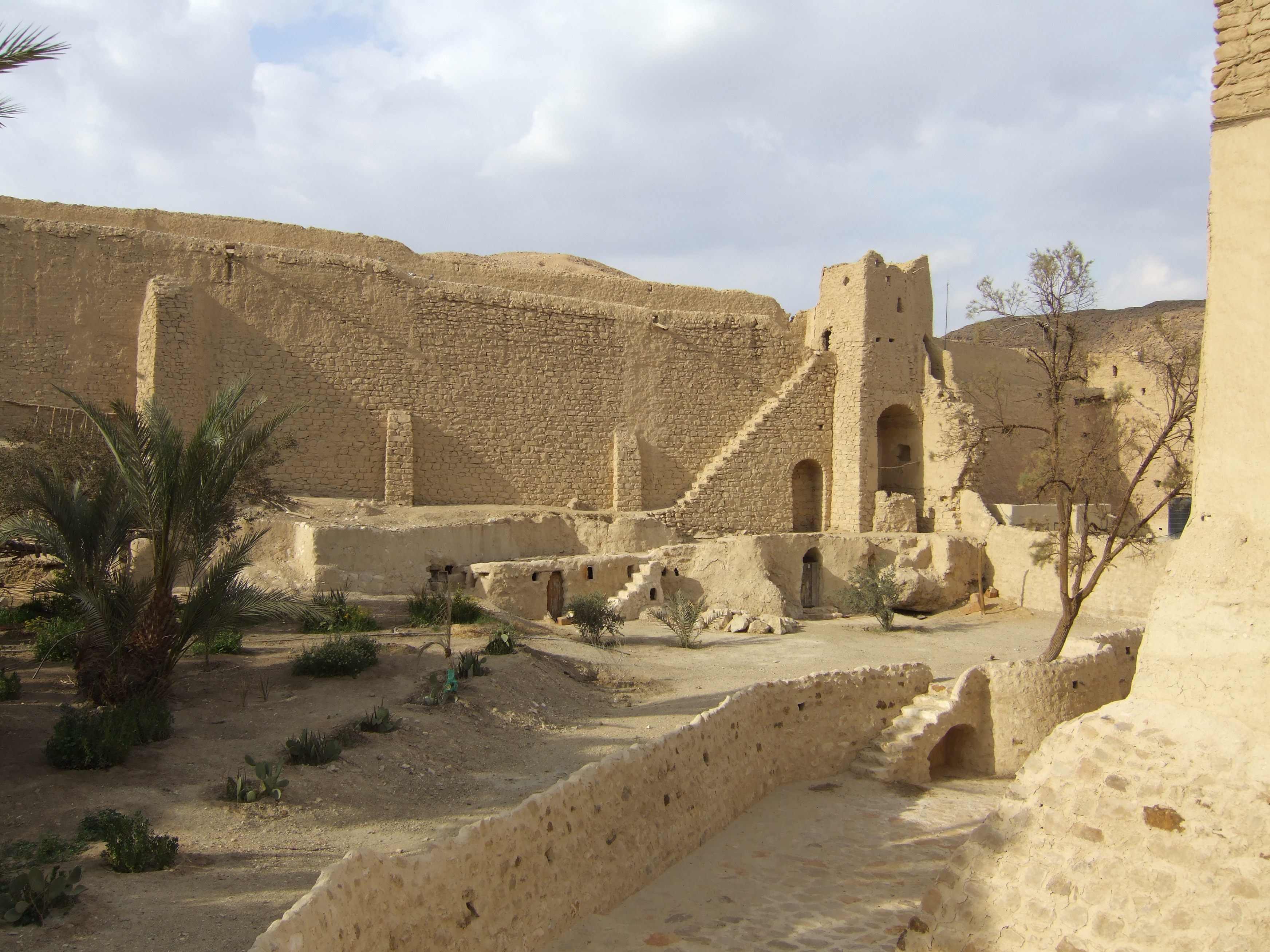 Foto LR - 2007